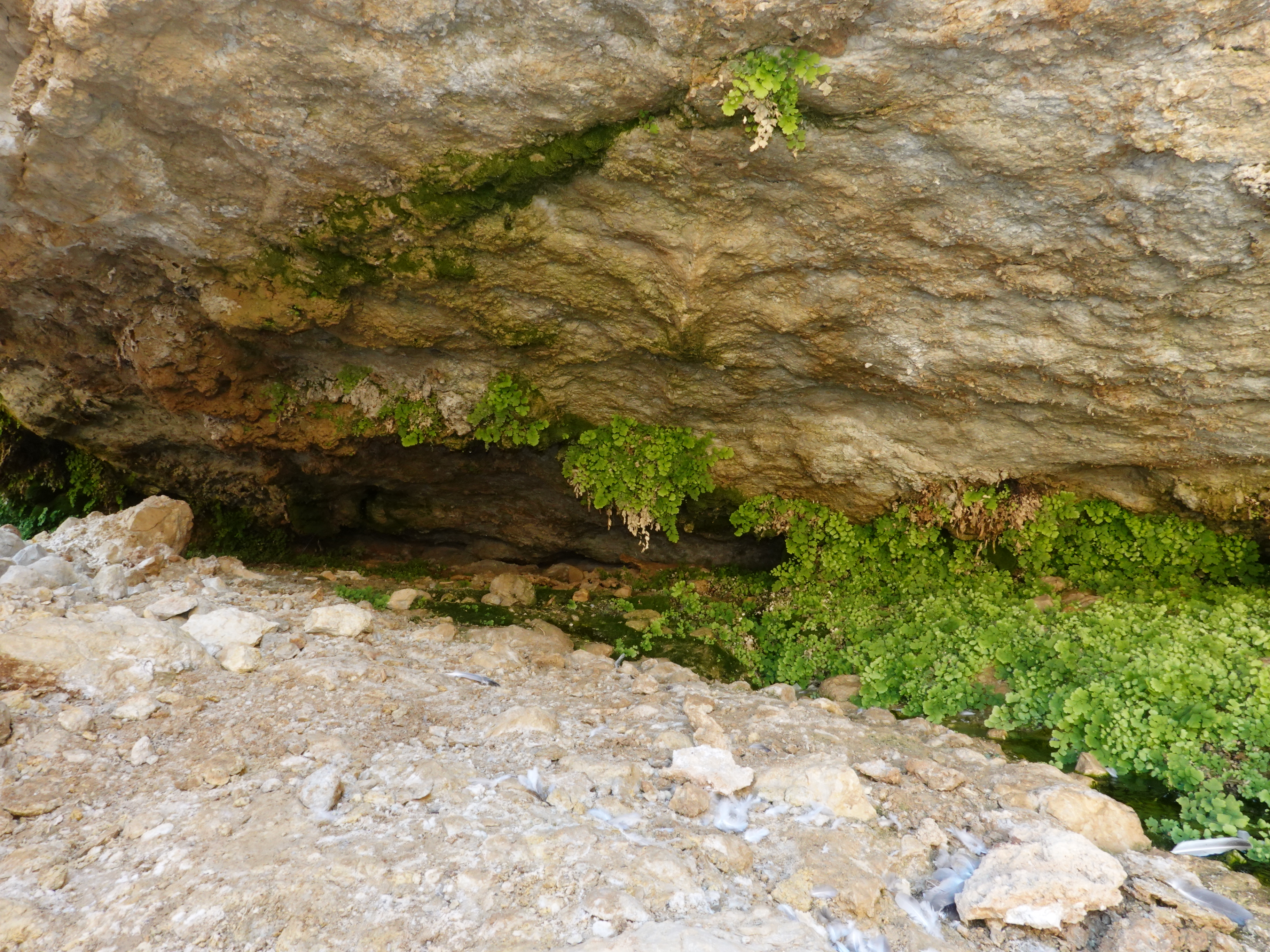 הנביעה בעין נטפים